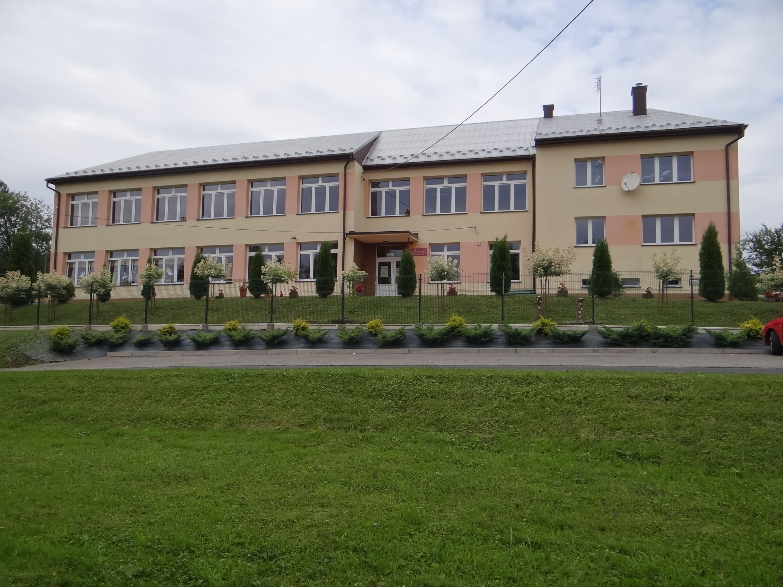 Szkoła w Buchcicach